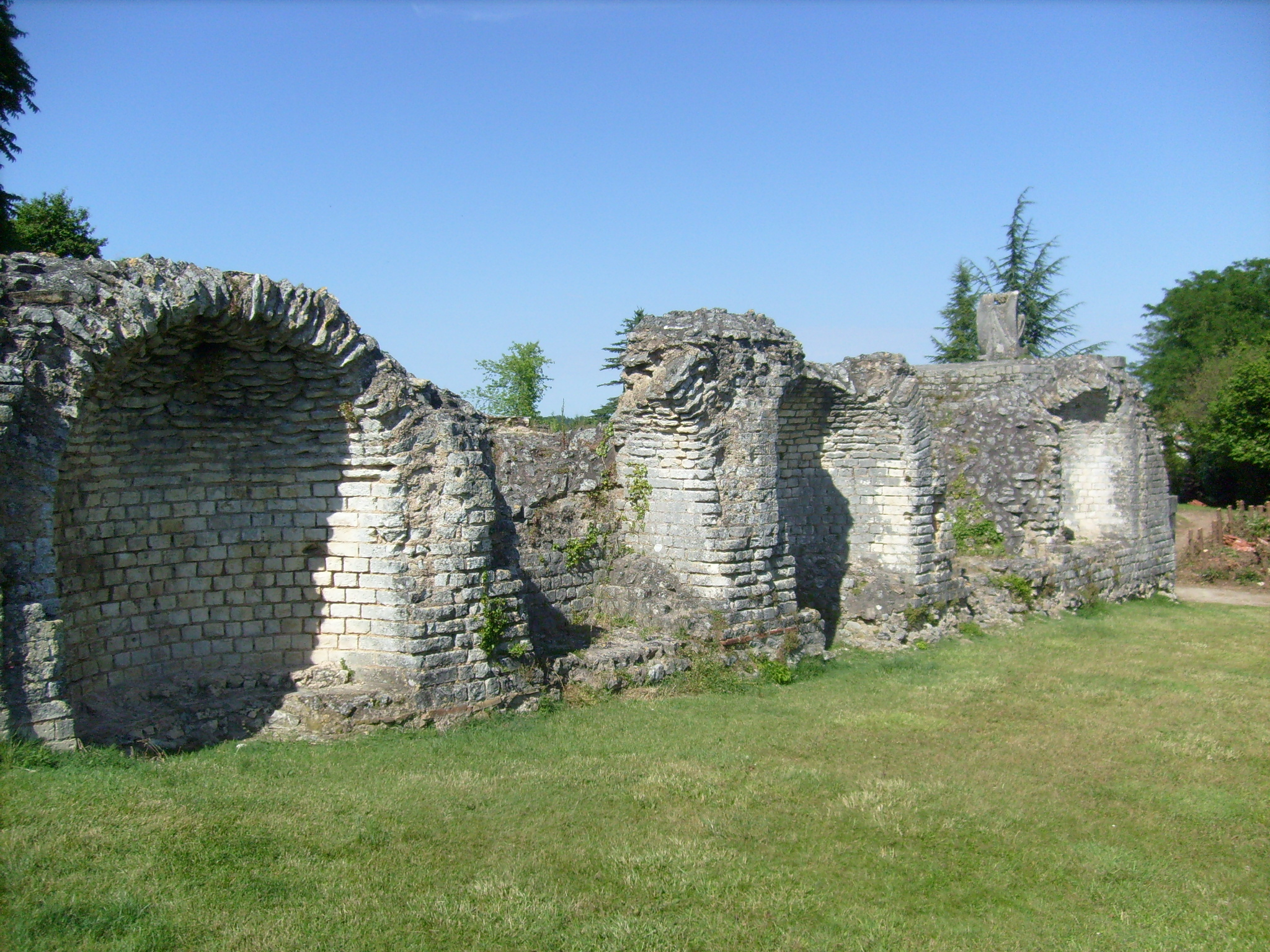 Les thermes Saint-Saloine de Saintes